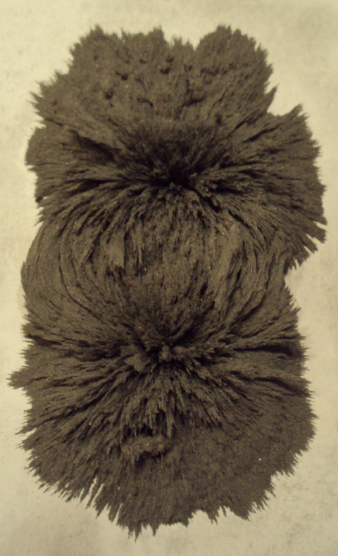 Visualisatie van magnetische veldlijnen met ijzervijlsel